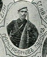 Портрет на Марко Иванов.